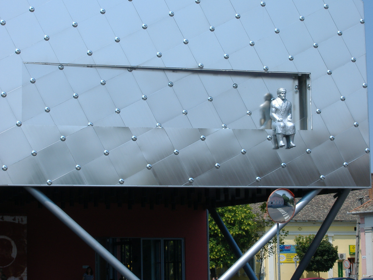 A hódmezővásárhelyi Emlékpont épülete (részlet). A bejárat felett üldögélő Lenin